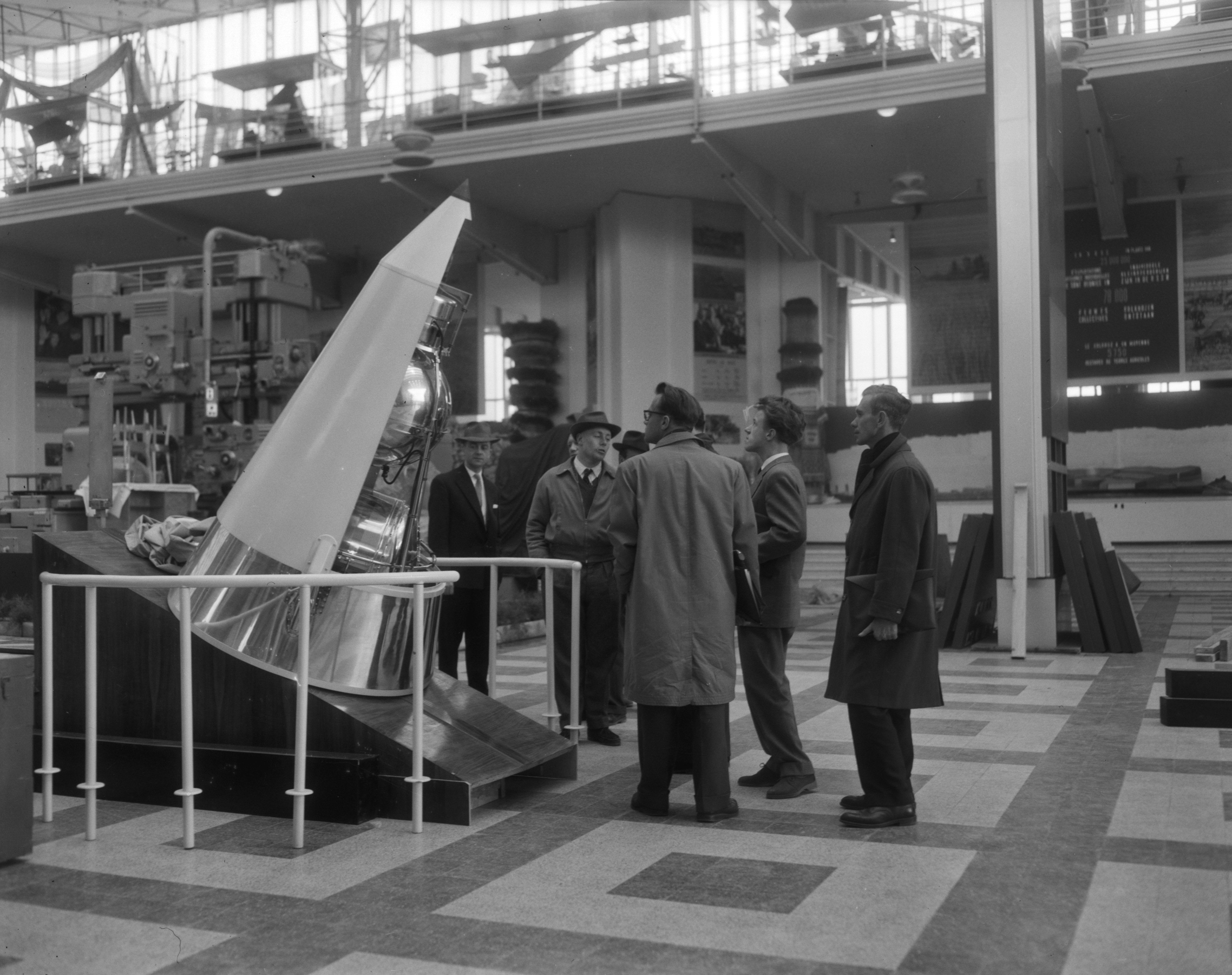 Collectie / Archief : Fotocollectie Anefo Reportage / Serie : [ onbekend ] Beschrijving : Spoetnik II in Russisch paviljoen Datum : 15 april 1958 Fotograaf : Pot, Harry / Anefo Auteursrechthebbende : Nationaal Archief Materiaalsoort : Negatief (zwart/wit) Nummer archiefinventaris : bekijk toegang 2.24.01.04 Bestanddeelnummer : 909-4860